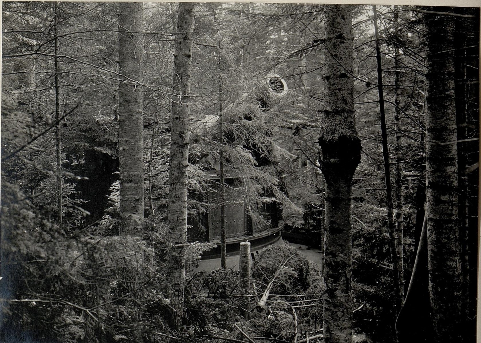 42 cm Mörser am Monte Rover. Aufgenommen im Mai 1916.